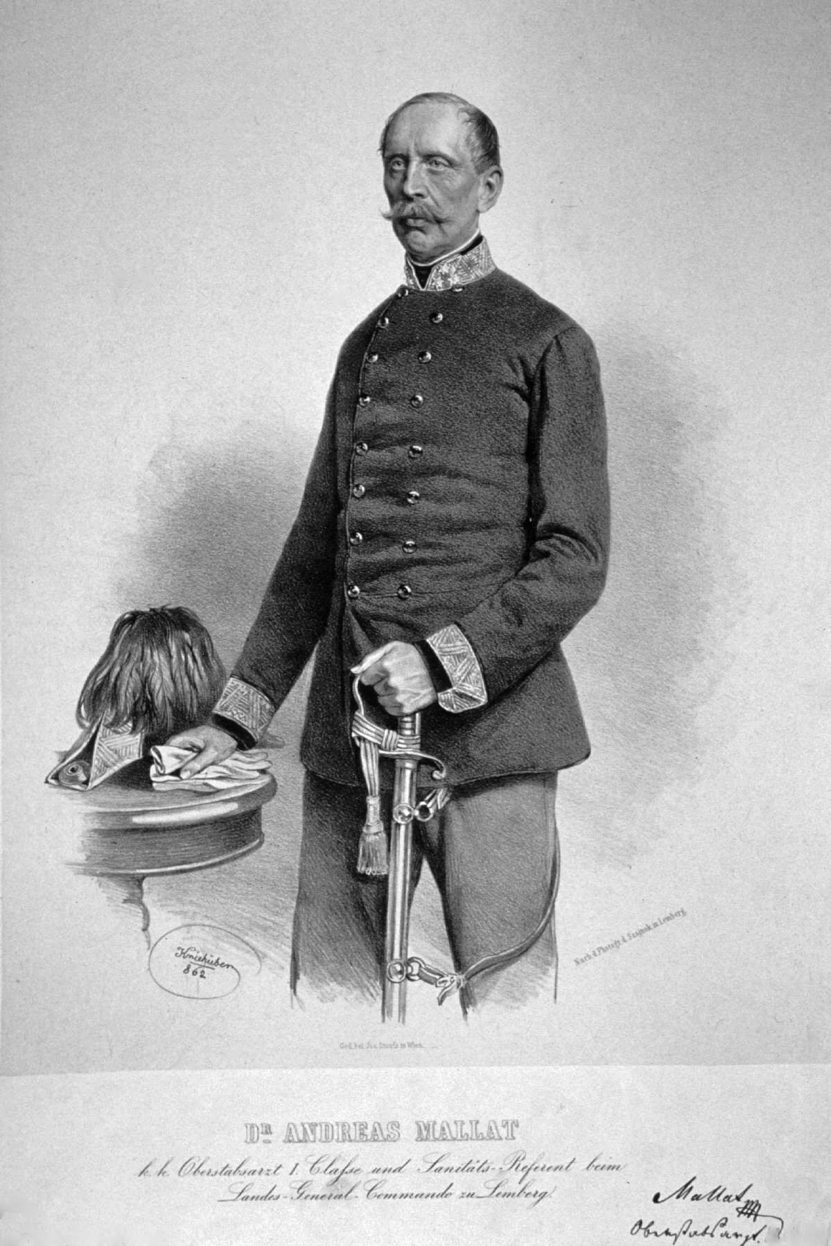 Andreas Mollat (1802-1891) k. k. Oberststabsarzt.Lithographie von Josef Kriehuber, 1862. Nach einem Foto von Szajuok, Lemberg